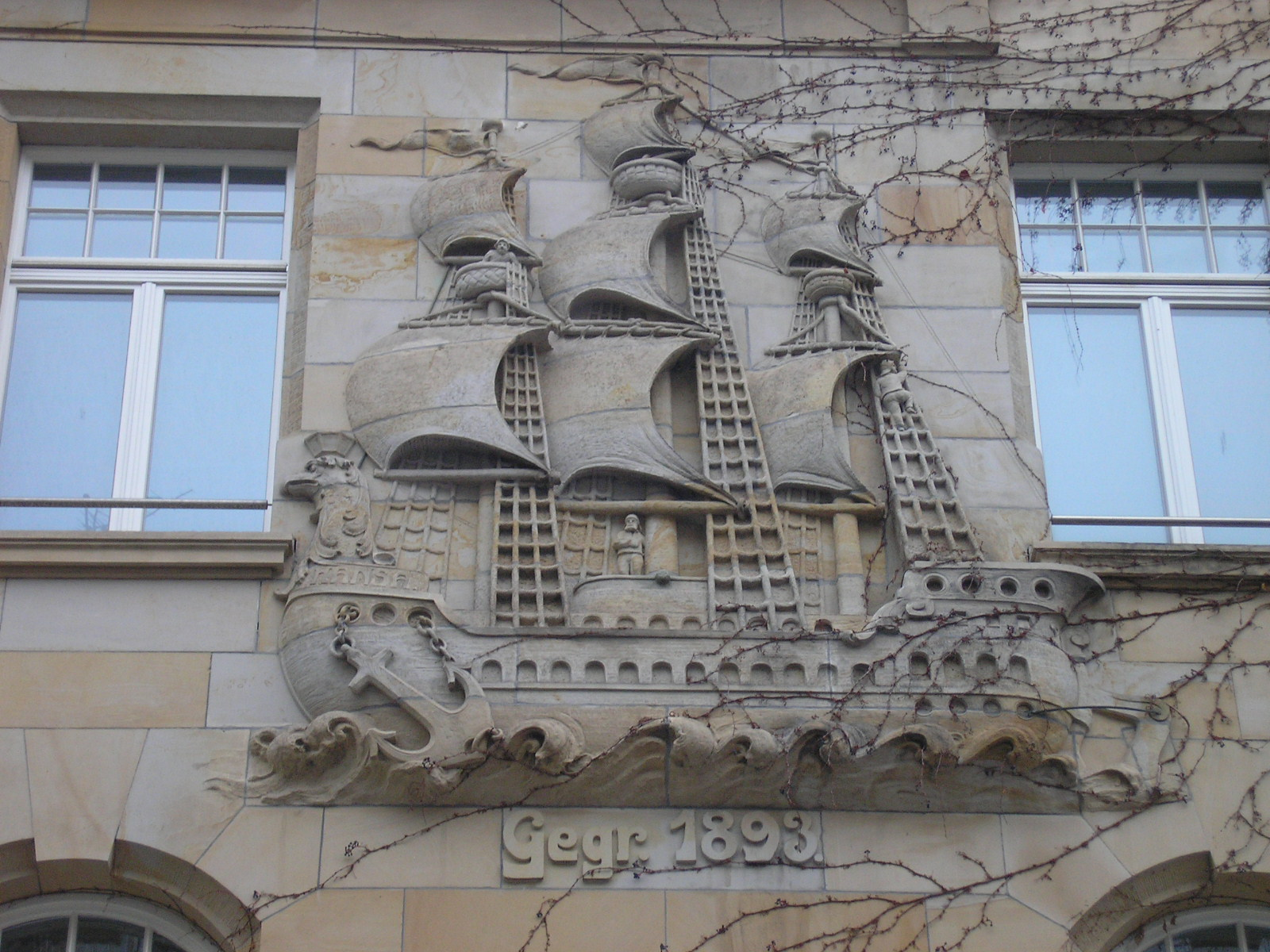 Ein Fassadenrelief an einem Handelshaus in Gotha (Thüringen).